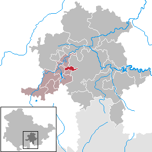 Döschnitz in Thuringia - District Saalfeld-Rudolstadt